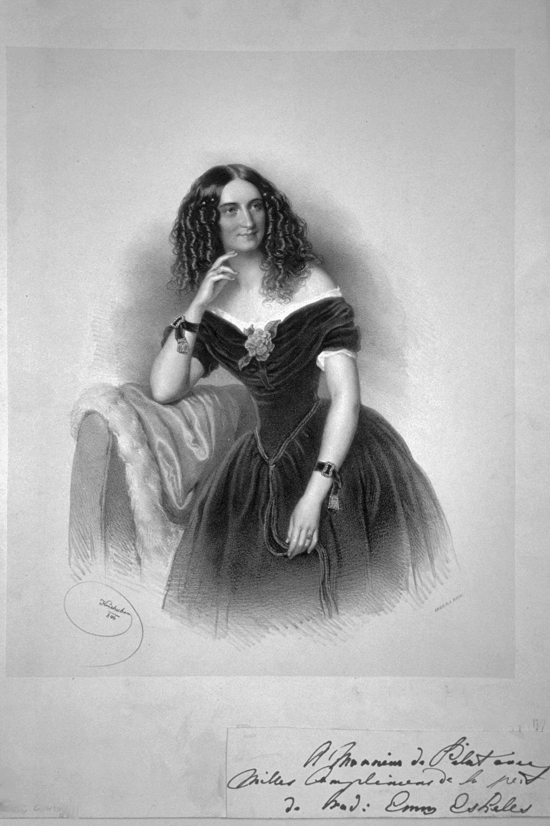 Emilie Eskeles, geb. Brentano-Cimaroli (1809-1880), Baronin, letzte Ehefrau von Daniel Denis Eskeles, Salondame